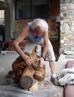 Skulpturim në dru